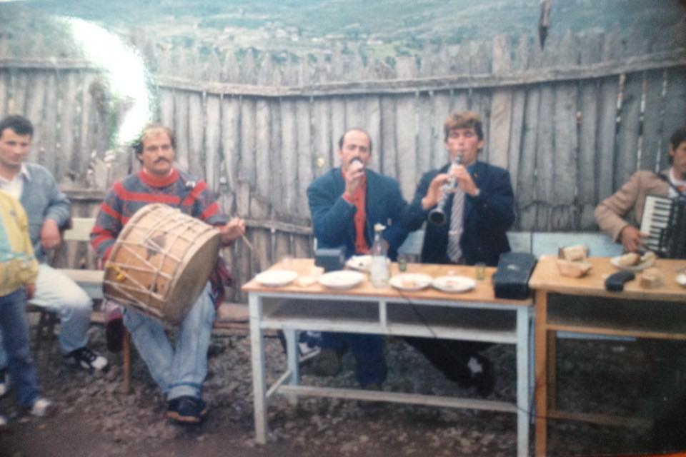 grup i muzikes ne dasem